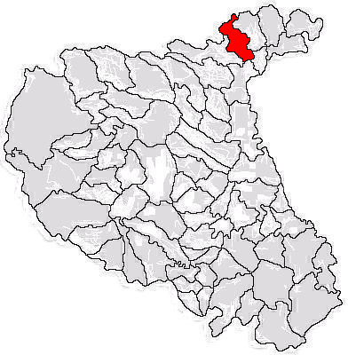 Categorie:Hărţi ale judeţului Vrancea